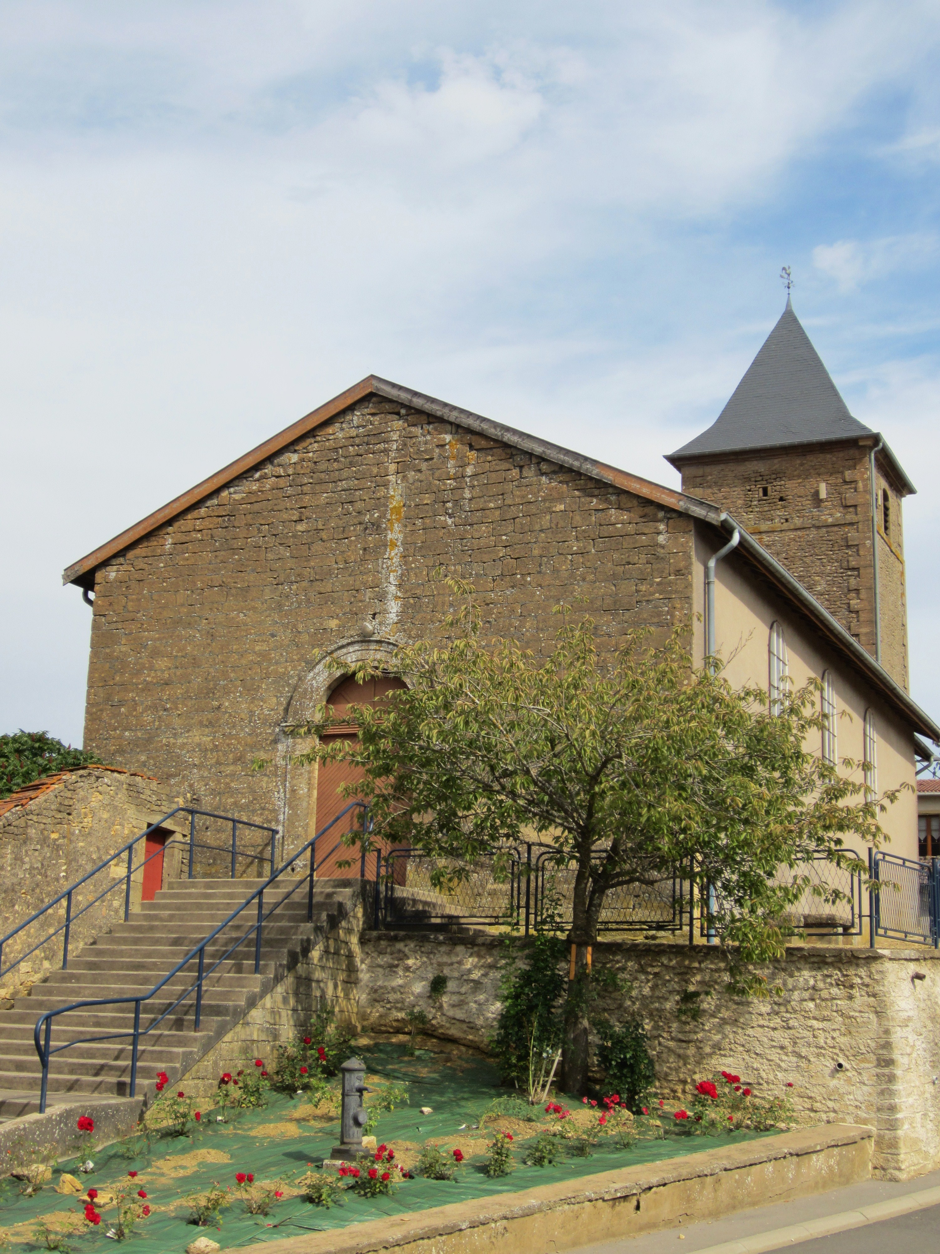 Description Église Saint-Étienne Anderny Date16 September 2011Sourcemon appareil photoAuthorAimelaimePermission(Reusing this file) Église Saint-Étienne Anderny